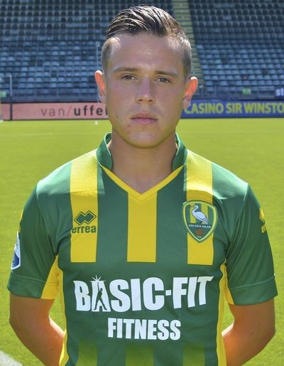 Giovanni Korte